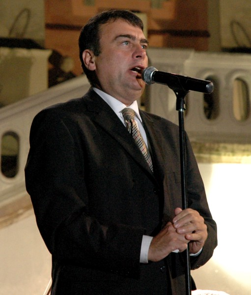 Paweł Sztompke podczas I Zamojskiego Festiwalu Kultury im. Marka Grechuty w Zamościu